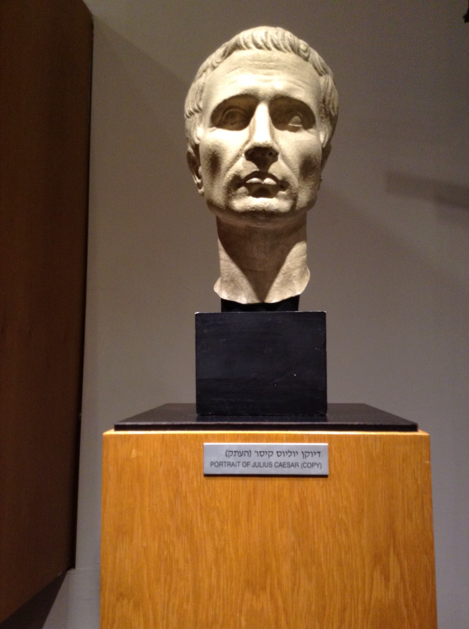 יוליוס קיסר